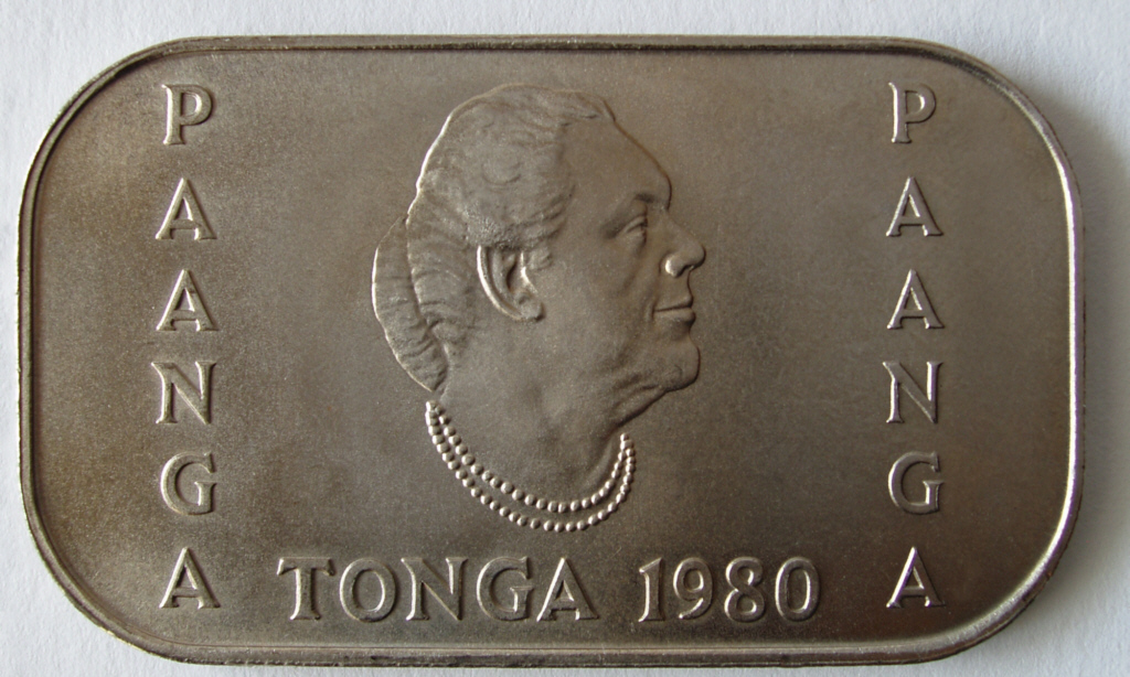 Tonga, 1 Pa'anga, 1980, front, 27 x 42 mm, cu/ni